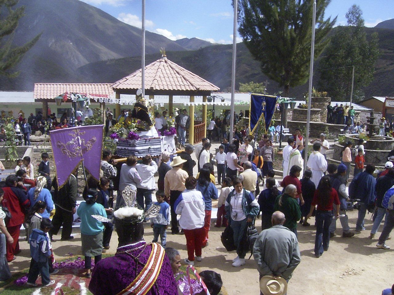 Fiestas patronales en Magdalena, Chachapoyas, Amazonas, Peru.